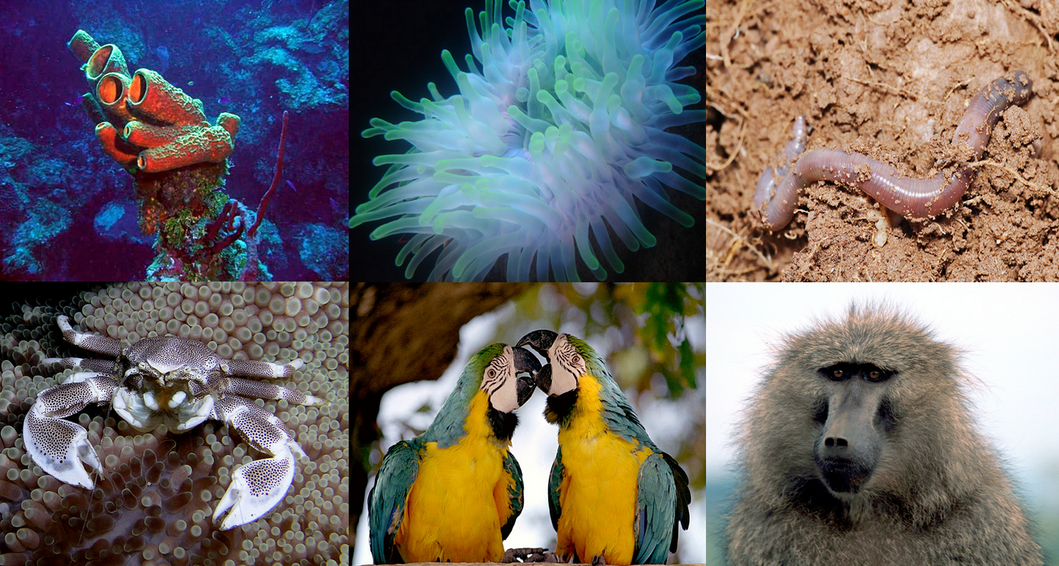 Une vue très globale pour illustrer les Métazoaires